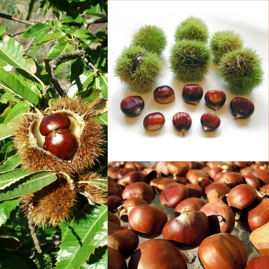 Grafika podręcznika Wikijunior:Owoce. Kasztan jadalny (Castanea sativa).